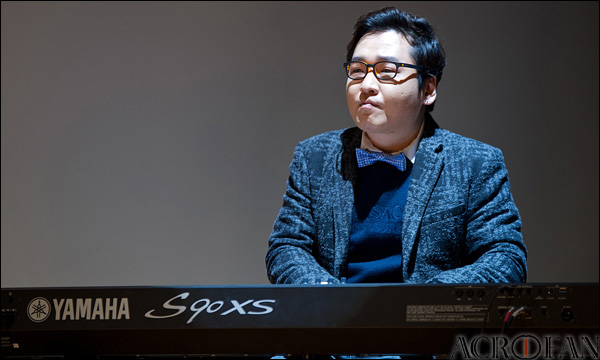 뮤지컬 서편제 쇼케이스 및 미니콘서트